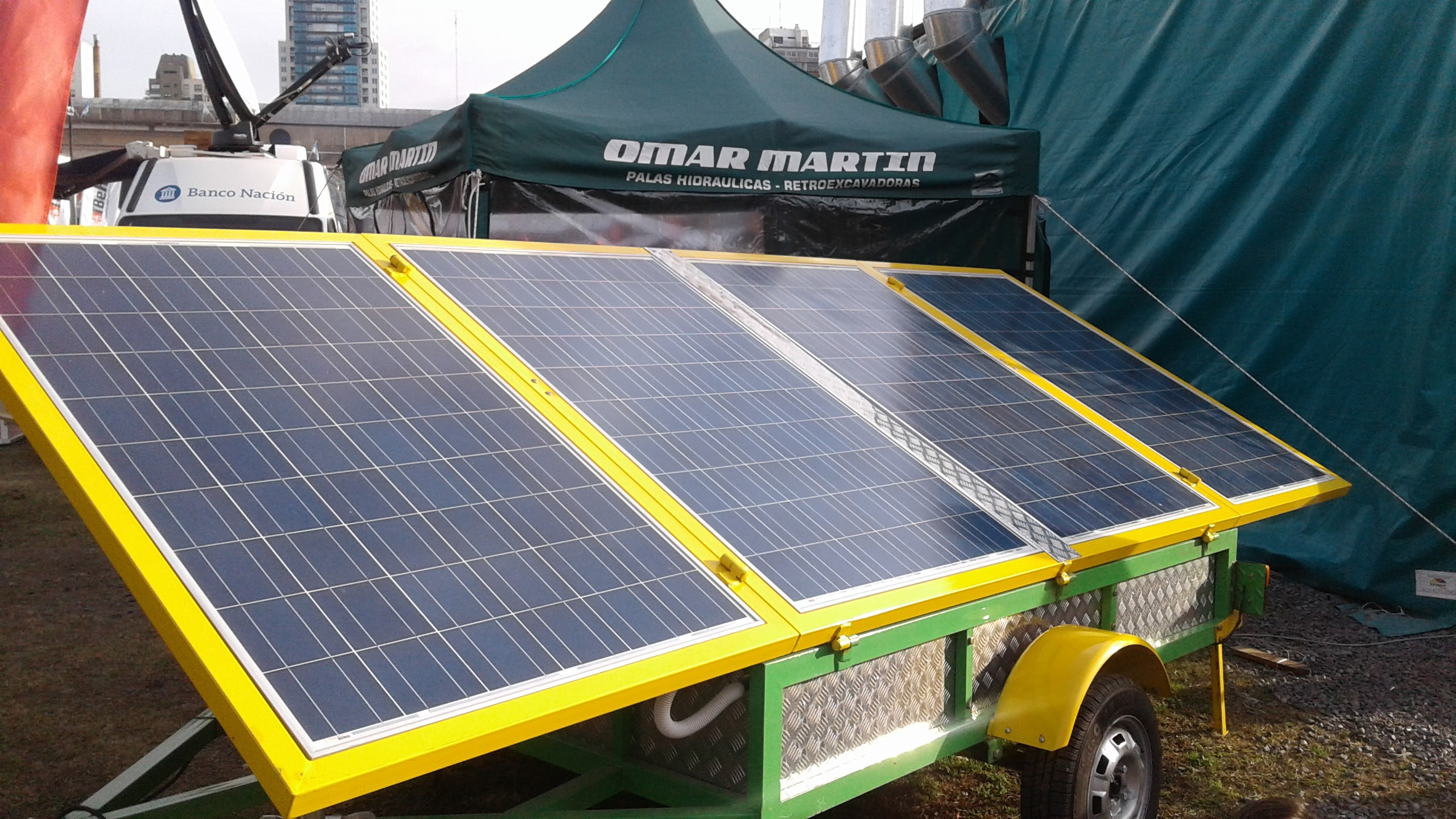 EL PANEL SOLAR DE ENERGÍA SE UTILIZA PARA EL CUIDADO DEL MEDIO AMBIENTE. SE CAPTA ENERGÍA DEL SOL BRINDANDO A LOS HOGARES LA ENERGÍA SUFICIENTE PARA ABASTECERLOS Y QUE LAS PERSONAS QUE VIVEN ALLÍ TENGAN ENERGÍA DISPONIBLE PARA TENER UNA BUENA CALIDAD DE VIDA CUIDANDO EL PLANETA.